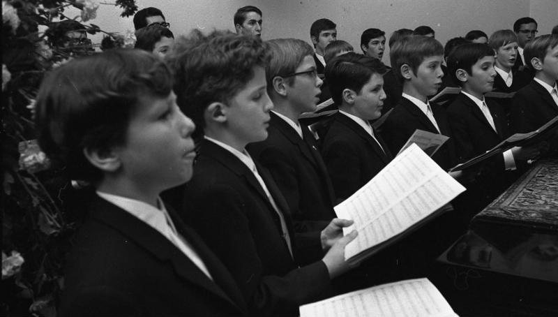 Konzert der Stuttgarter Hymnus Chorknaben in der Vertretung Baden-Württemberg